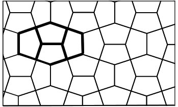 teselación de El Cairo, tesela pentágono irregular, teselación, geometría